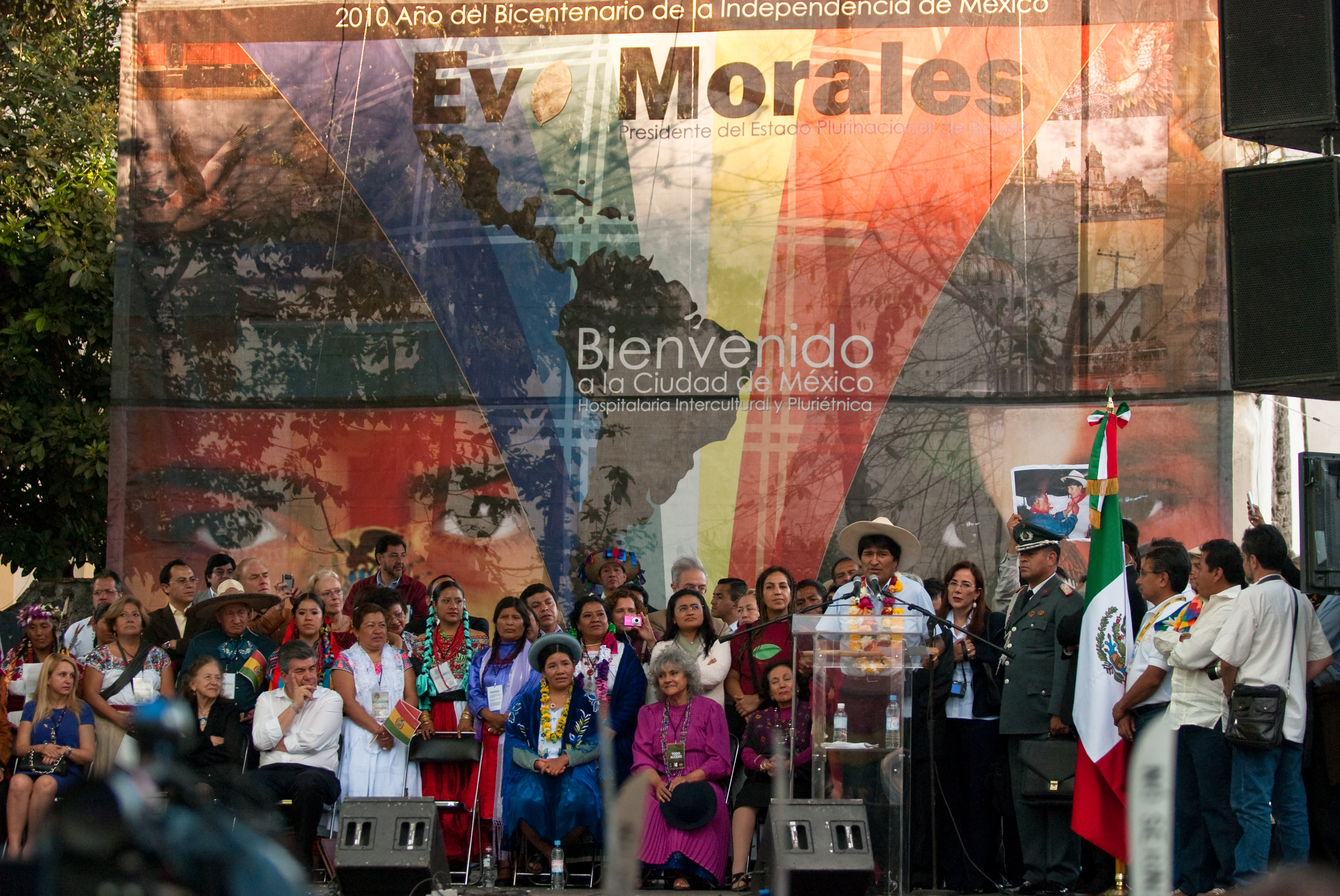 Vino a darnos un ejemplo de dignididad y a pronunciarse a favor de las causas indígenas y sociales de México. Escuchándolo hablar me di cuenta de lo lejos que estamos de Bolivia en el plano ideológico. Ese gobierno se coloca, casi casi, en un mundo alterno al nuestro, pareciese inalcanzable. Me dio un poco de envidia. Y ganas de seguir en esto del "movimiento". "Pronto México se liberará"